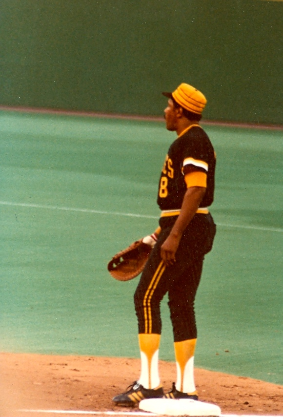 Veterans Stadium, Philadelphia, 1979